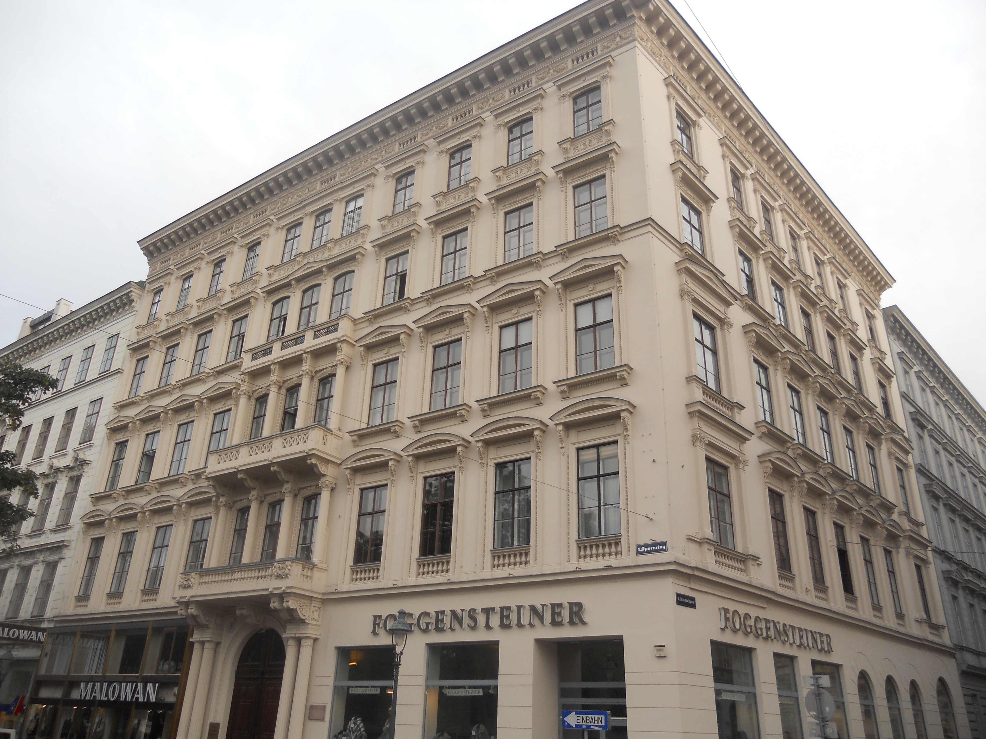 Haus Opernring 23 in Wien, ehemaliges Wohnhaus Franz von Suppés